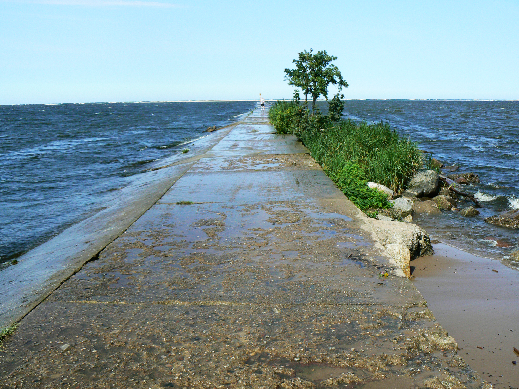 Obszar specjalnej ochrony ptaków Ujście Wisły. This is a photography of Natura 2000 protected area with ID PLB220004